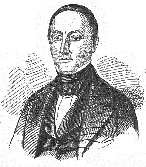 Carl Fougstad